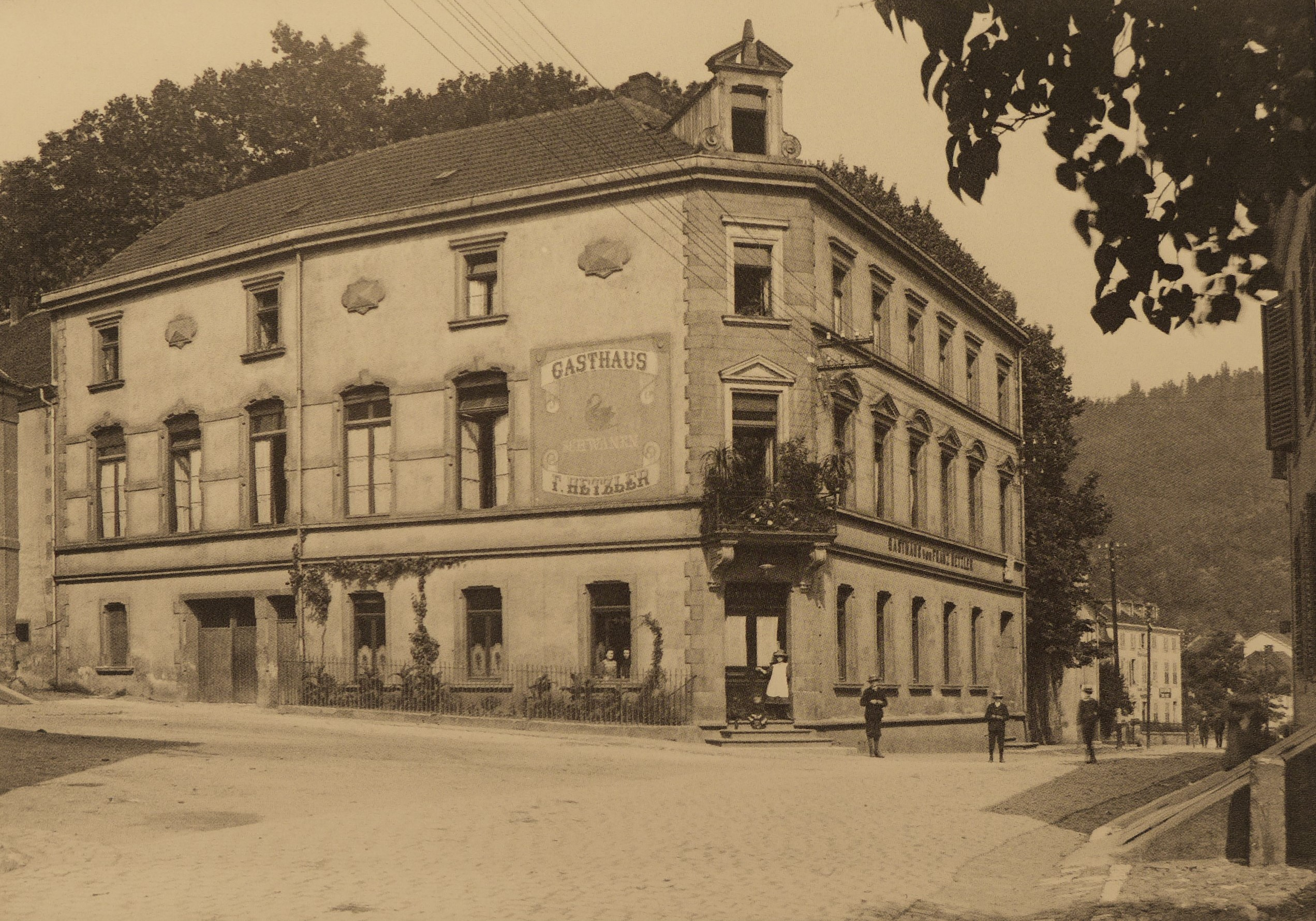 Wallerfangen, Gasthaus zum goldenen Schwanen (Hauptstraße 26), Historistischer Neorenaissance-Bau des Jahres 1897 anstelle eines barocken Gasthofes, abgerissen 2011 zu Gunsten eines Sparkassengebäudes, Standort des mittelalterlichen Wallerfanger Stadtpfarrfriedhofes (Archiv des Vereins für Heimatforschung Wallerfangen)